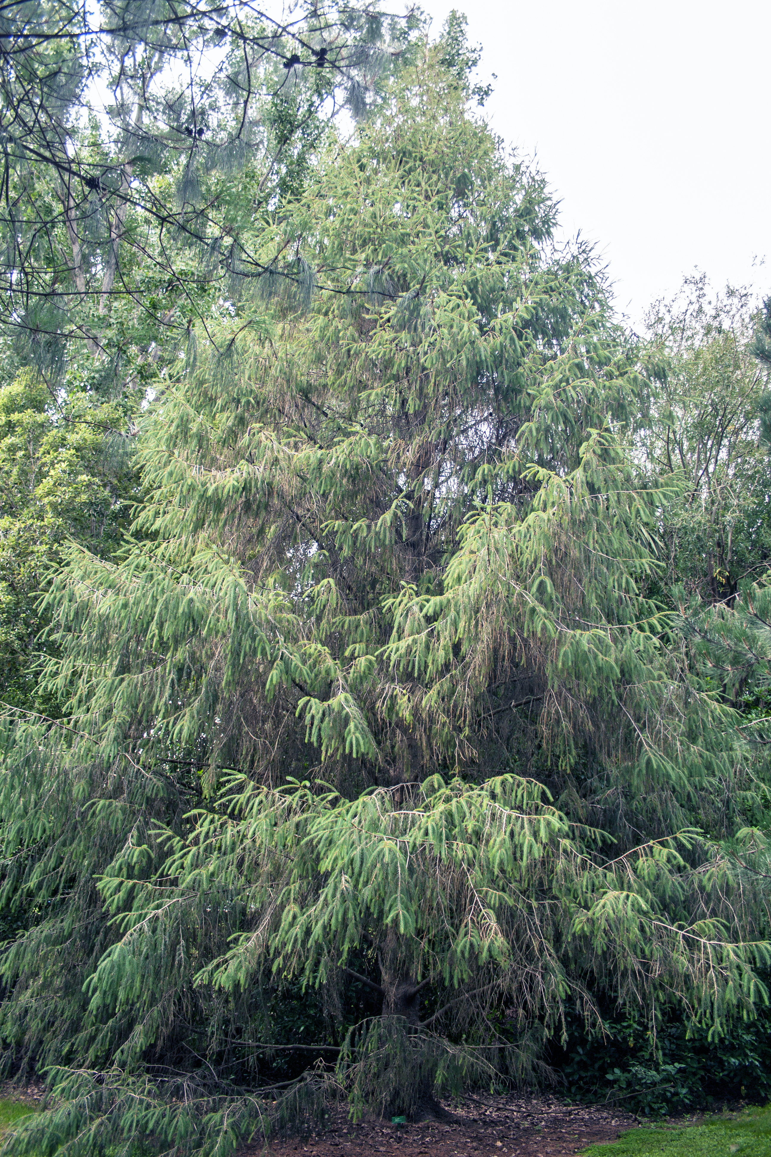 Picea brachytyla